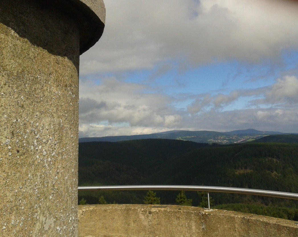 Blick zum Brocken und auf Sankt Andreasberg von der Aussichtsplattorm auf dem Knollenturm, Großer Knollen, Westharz, Niedersachsen